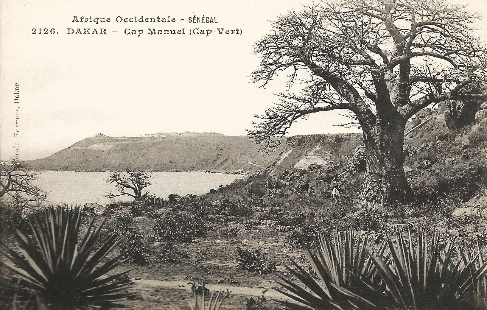 François-Edmond Fortier, Dakar. Cap Manuel. Cap-Vert. Afrique Occidentale - Sénégal.